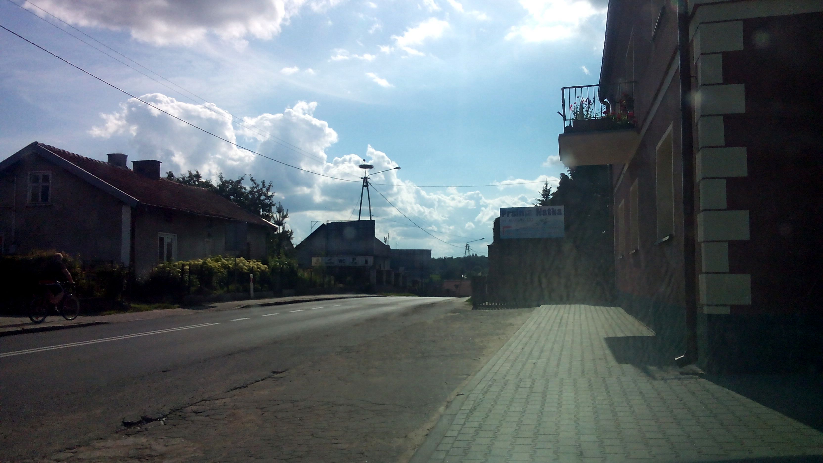 Gniazdo bociana białego znajdujące się we wsi Marcinkowo